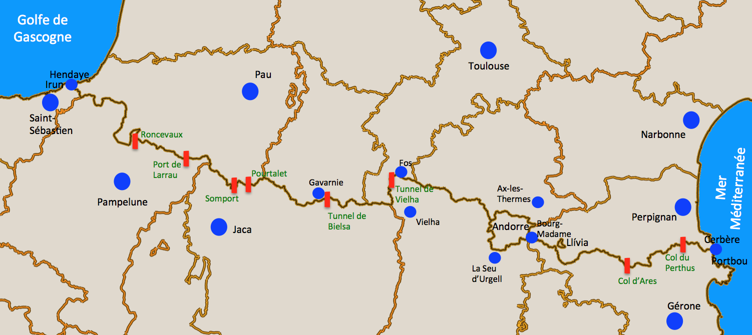 Pyrénées - Points de passage de la frontière